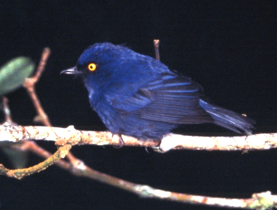 Diglossa glauca en Ecuador.